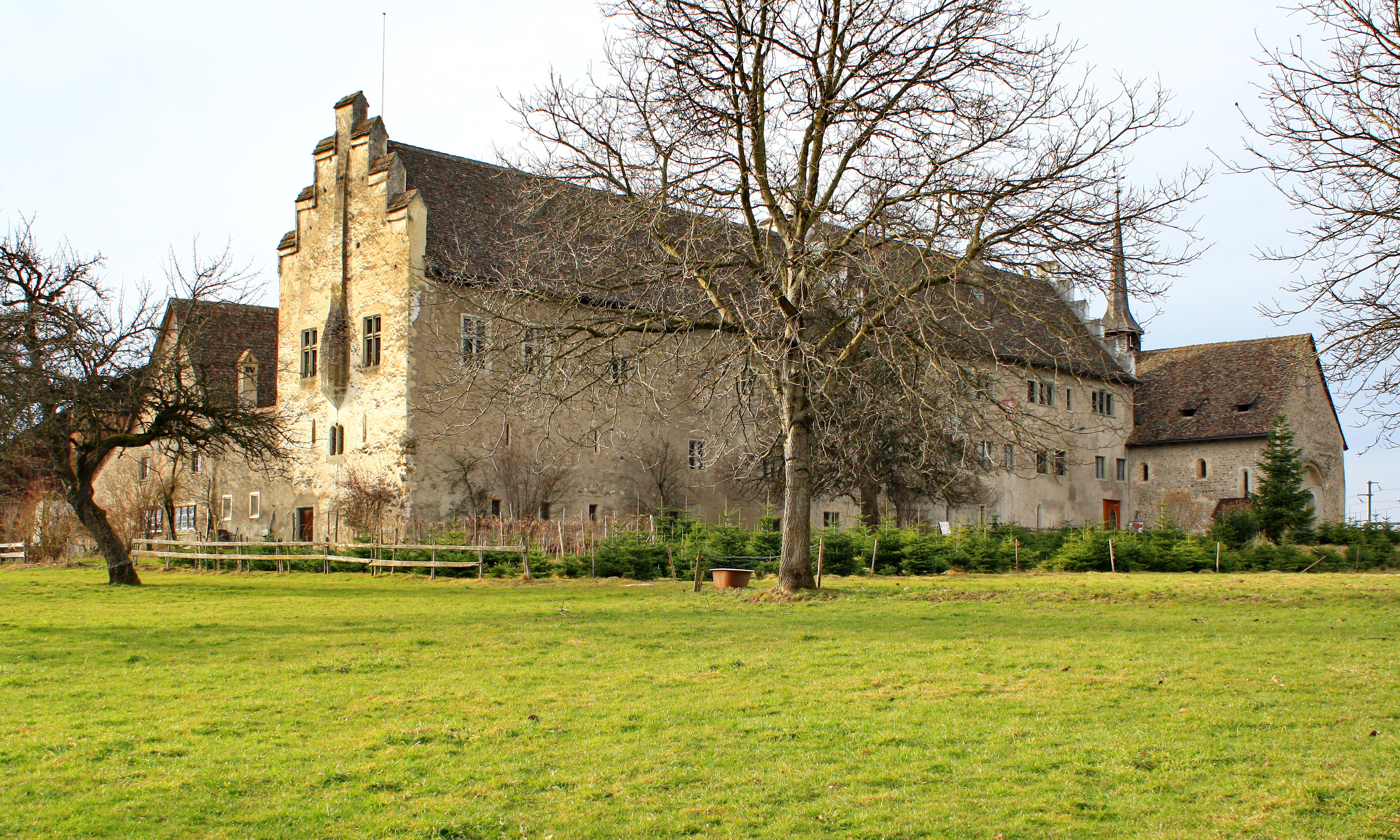 Ritterhaus in Bubikon (Switzerland)